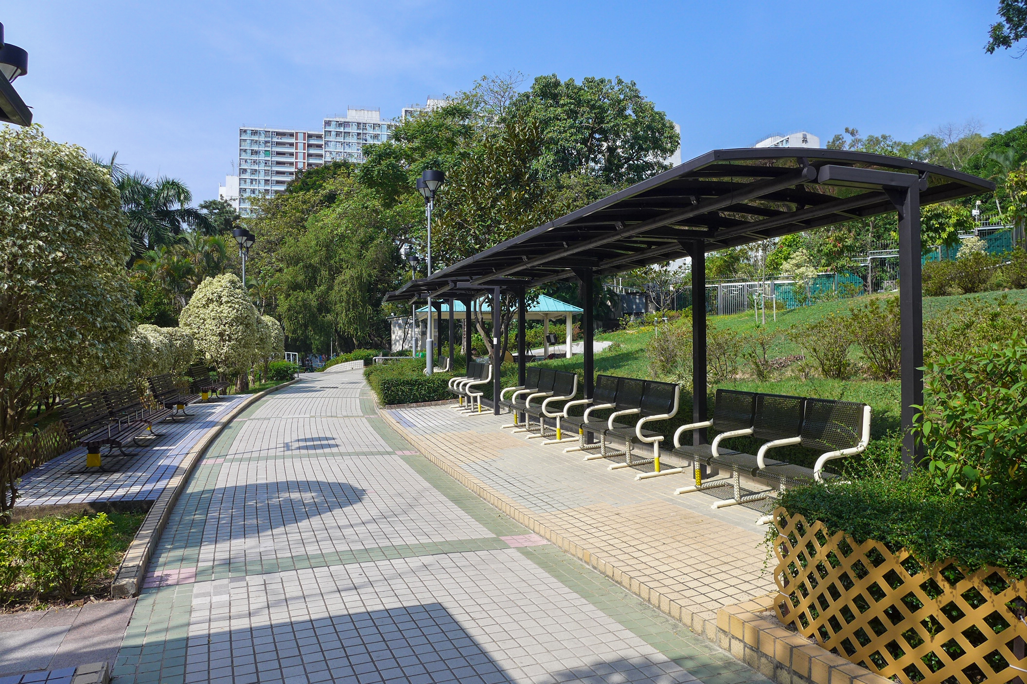 Morse Park No.3